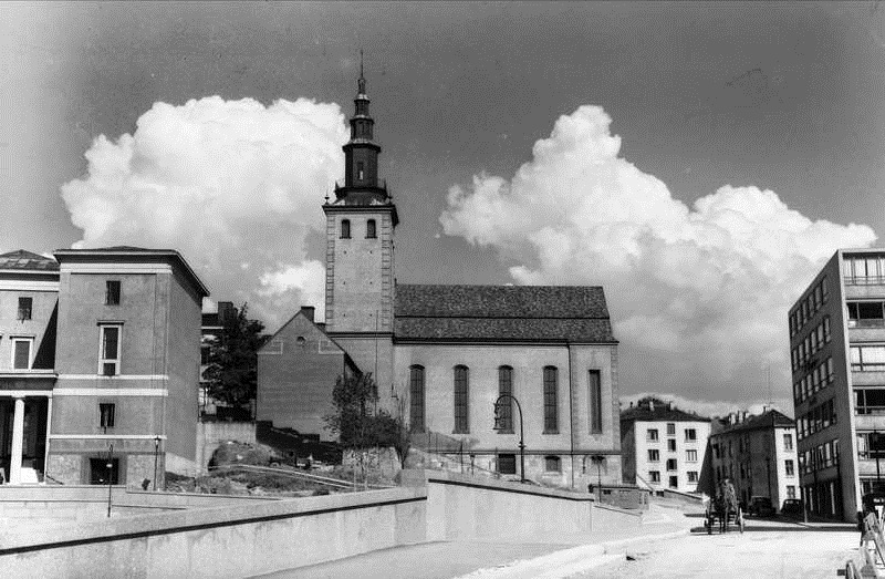 Margaretakyrkan, Deichmanske bibliotek, bygårder, hestekjøretøy.